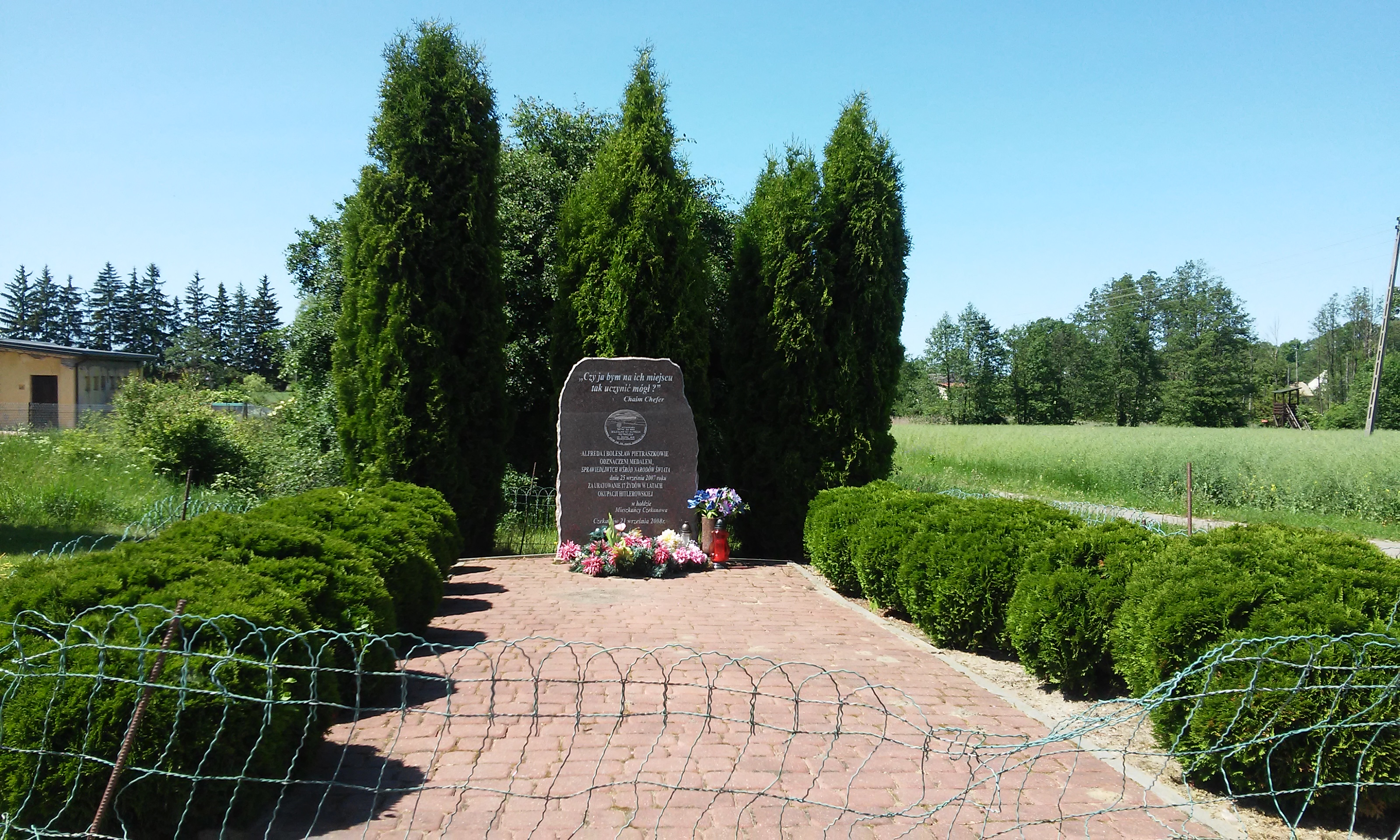 Pomnik Sprawiedliwych wśród Narodów Świata w Czekanowie